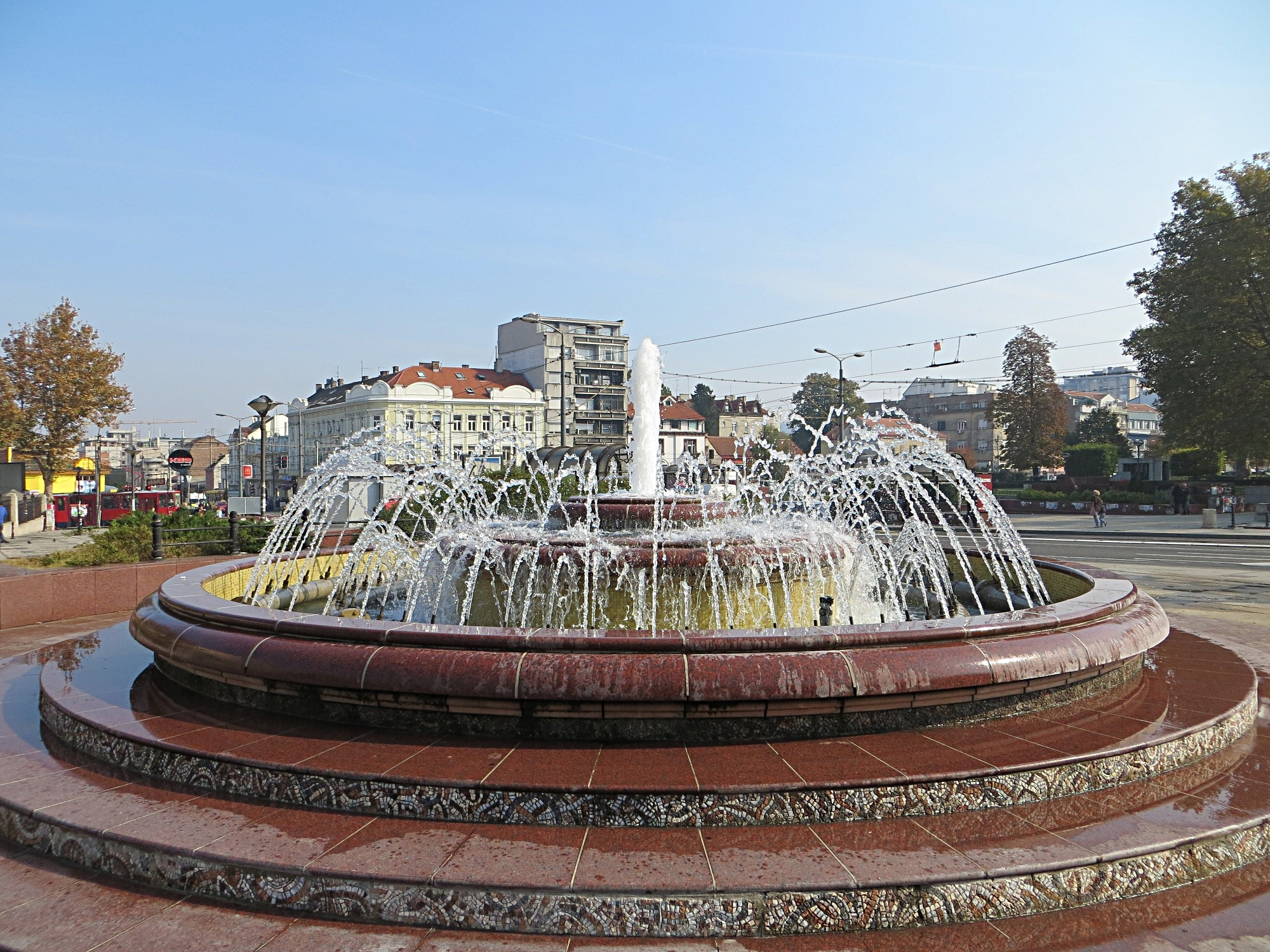 Ruzveltova